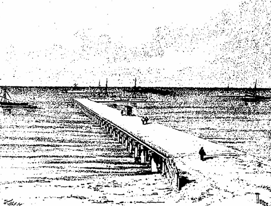 Carabane (Casamance, Sénégal) : "Le plus grand appontement de la côte d'Afrique construit par la Compagnie de la Casamance à Carabane"